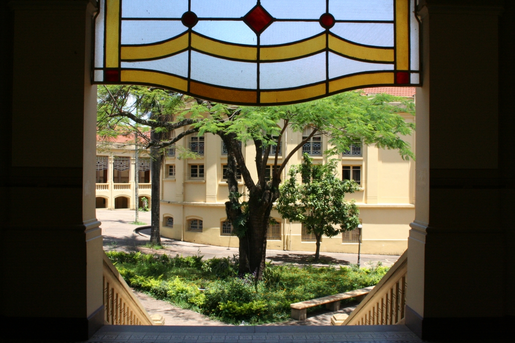 Vista de praça interna do Colégio Álvaro Guião, em São Carlos.